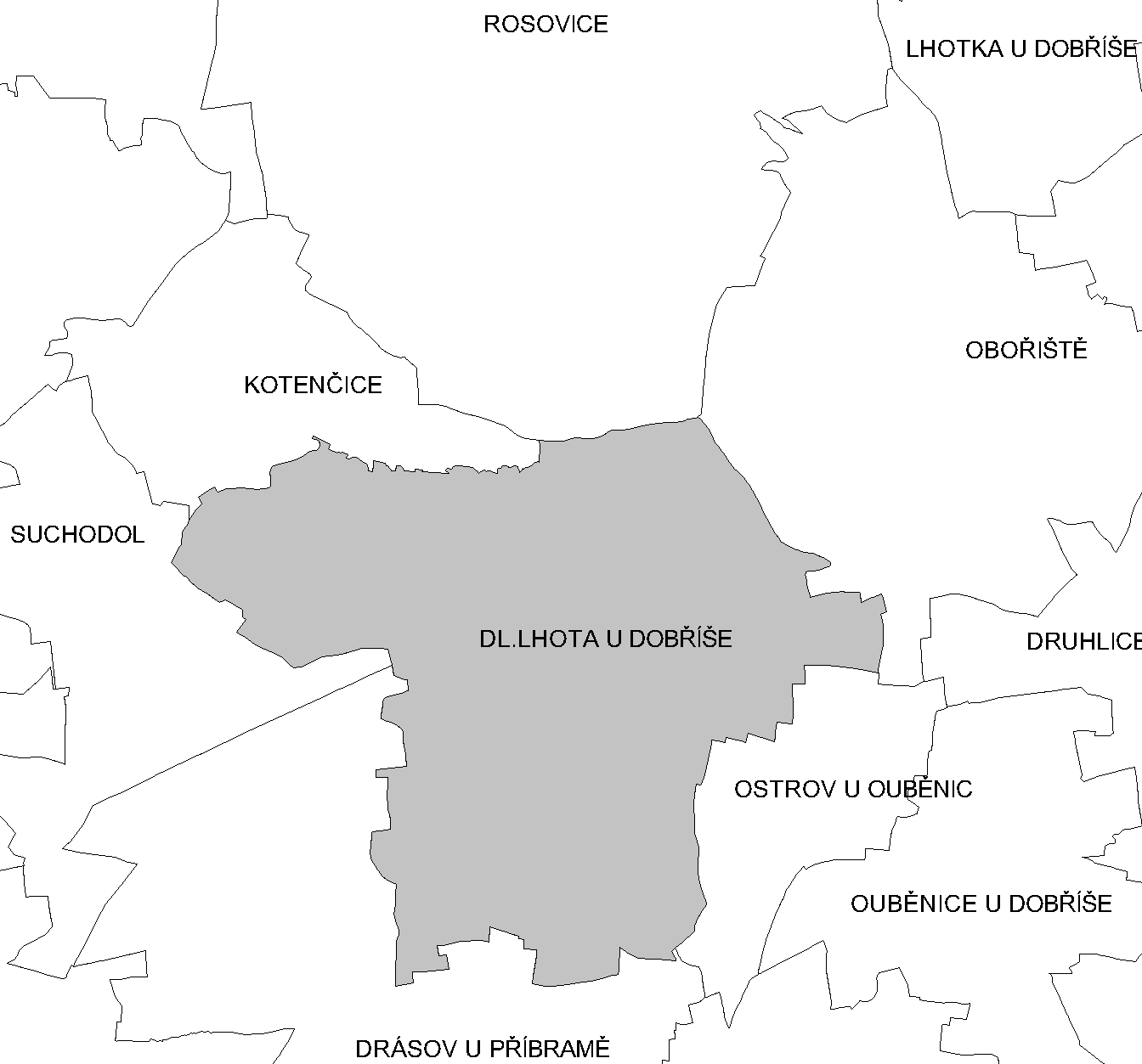 Katastr Dlouhé Lhoty